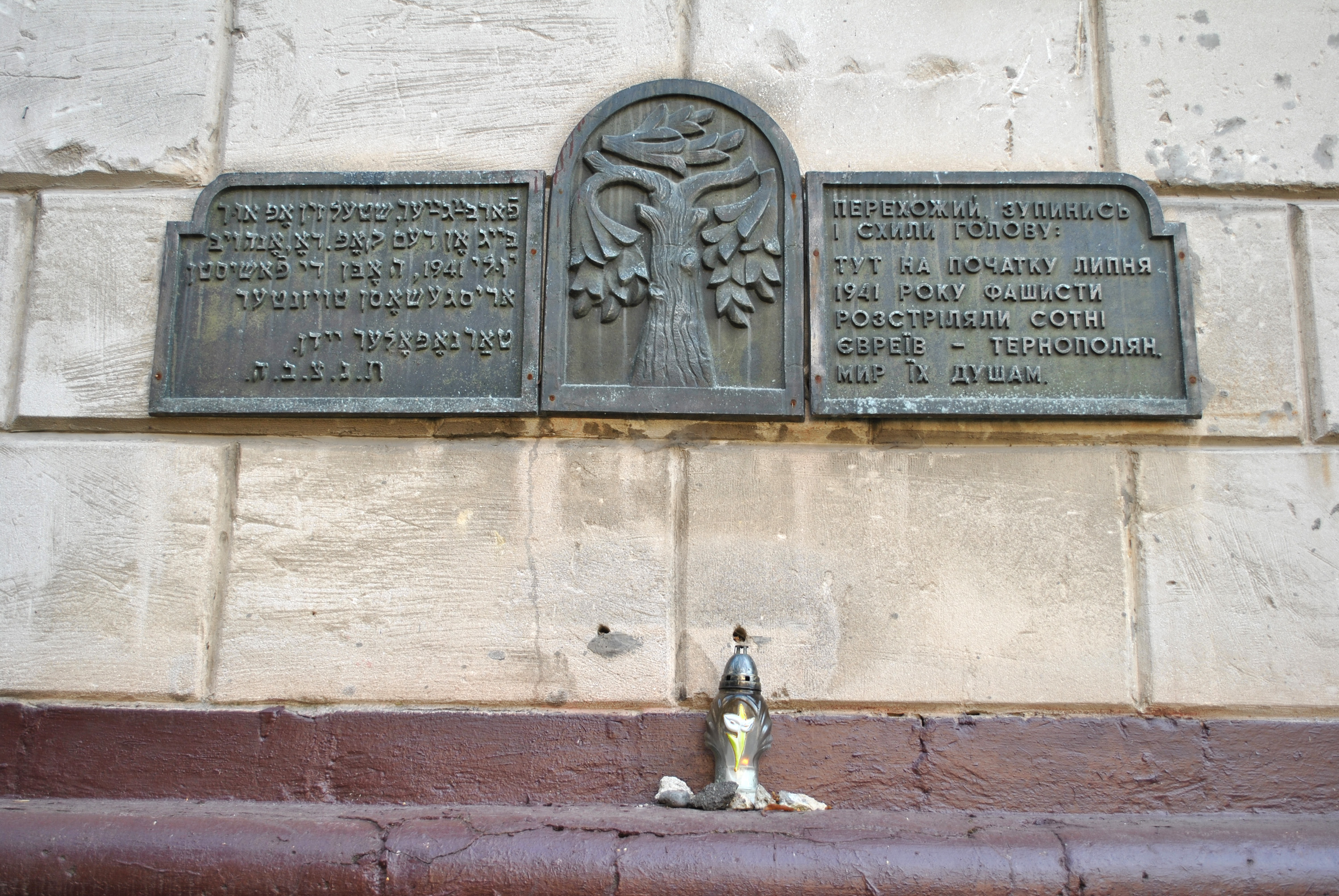 Пам'ятне місце, де нацисти розстріляли євреїв, Тернопіль, вул. Руська, 12, Морфологічний корпус.